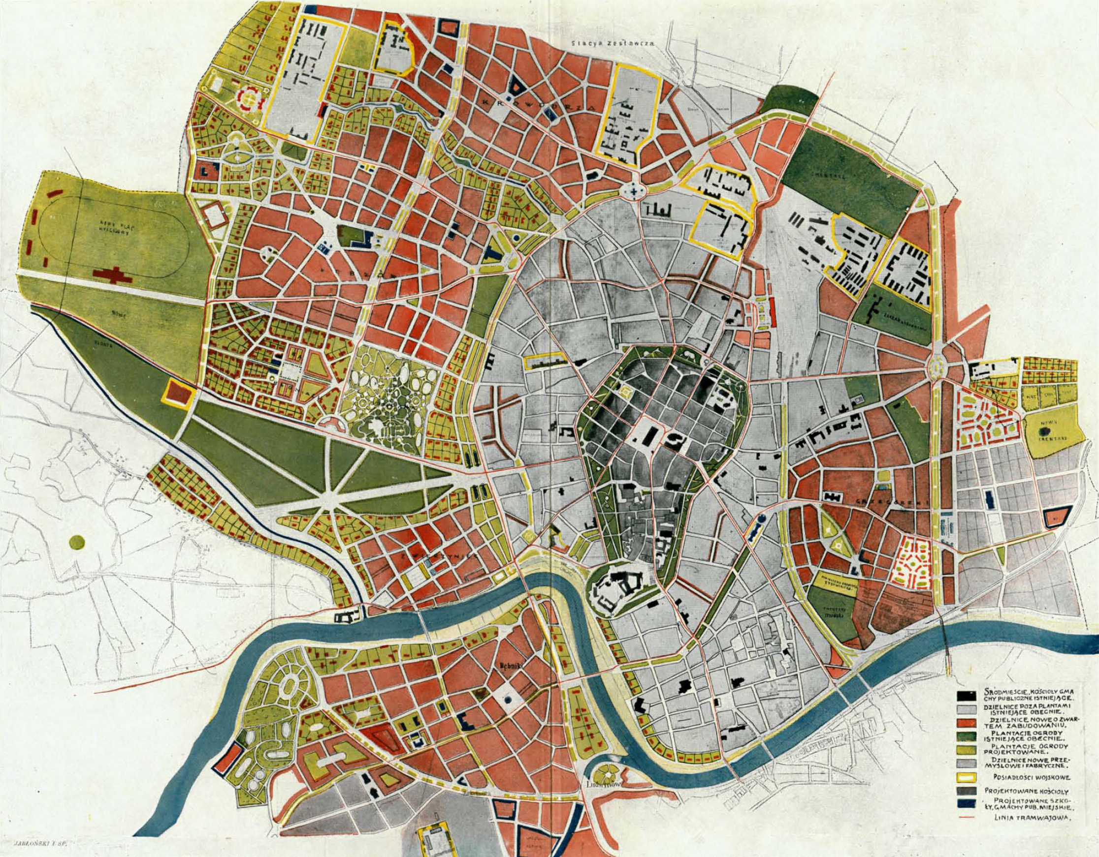 Конкурсний проект генерального плану «Великого Кракова». Здобув перше місце на конкурсі 1910 року. Автори Казімеж Вичинський (1876—1923), Людвік Войтичко (1873—1949), Владислав Екельський (1855—1927), Тадеуш Стриєнський (1849—1943), Юзеф Чайковський (1872—1947).